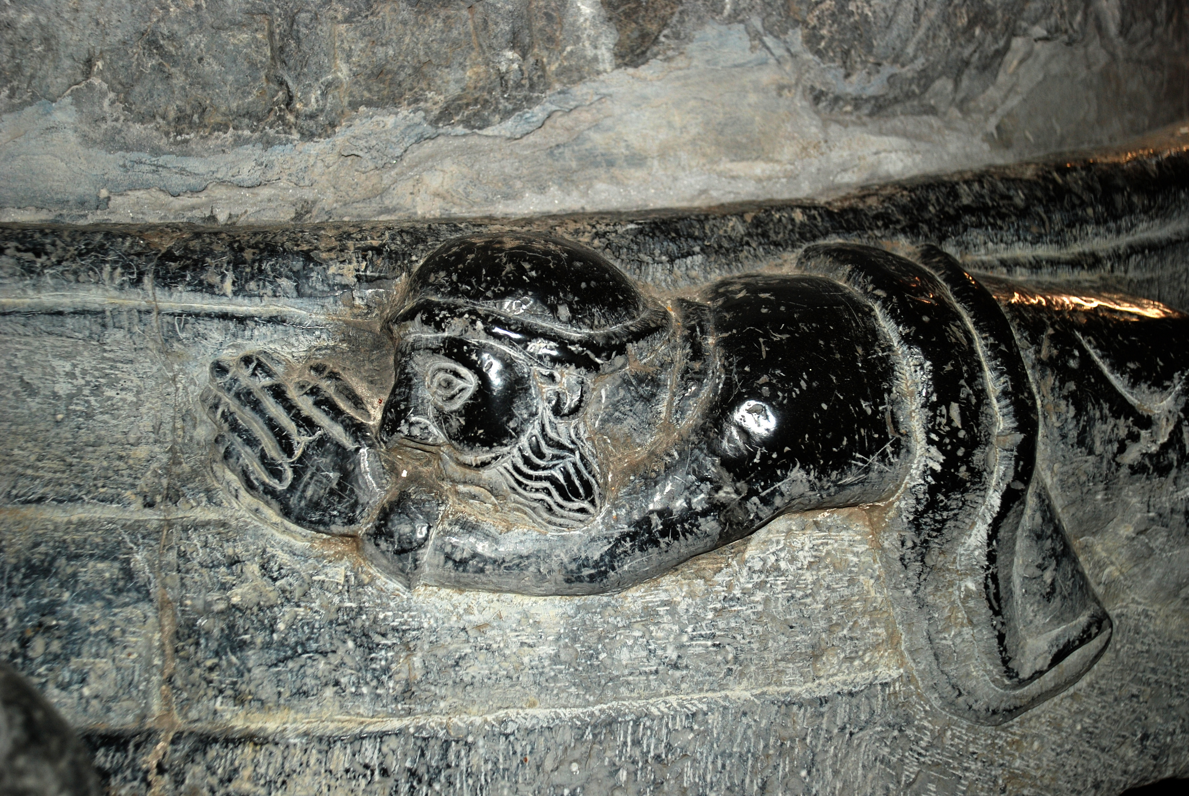 Belgique - Province de Namur - Fonts baptismaux de Furnaux - Lot prosterné